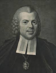 Domprosten Andreas Knös (1721-1799), avporträtterad av Ulrika Pasch. Runt halsen syns i guldkedja Gustav III:s faddertecken som Andreas erhöll den 27 december 1778.